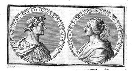 Gerard, Duke of Lorraine and his wife Hedwige of Namur